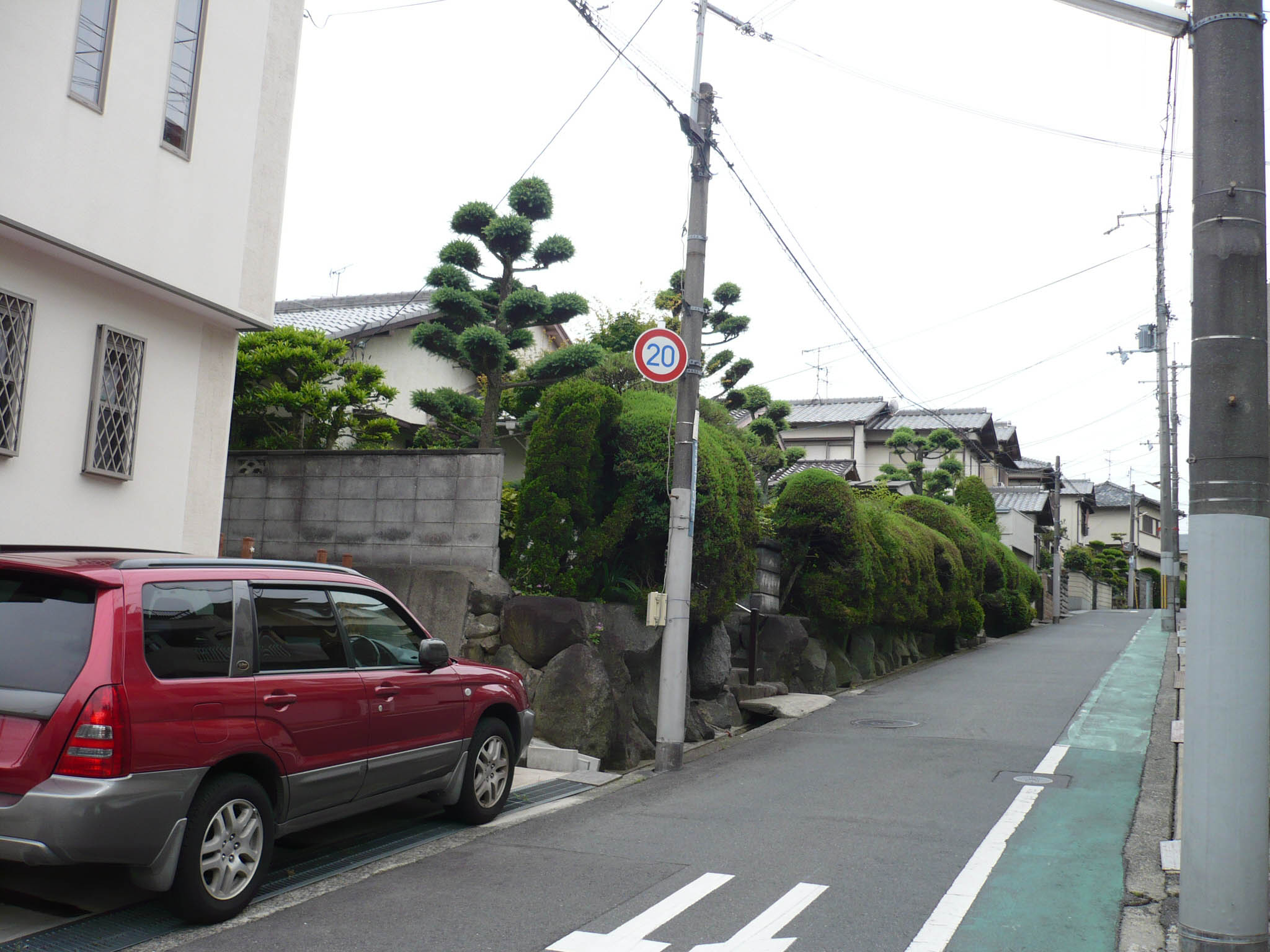 櫓台跡地